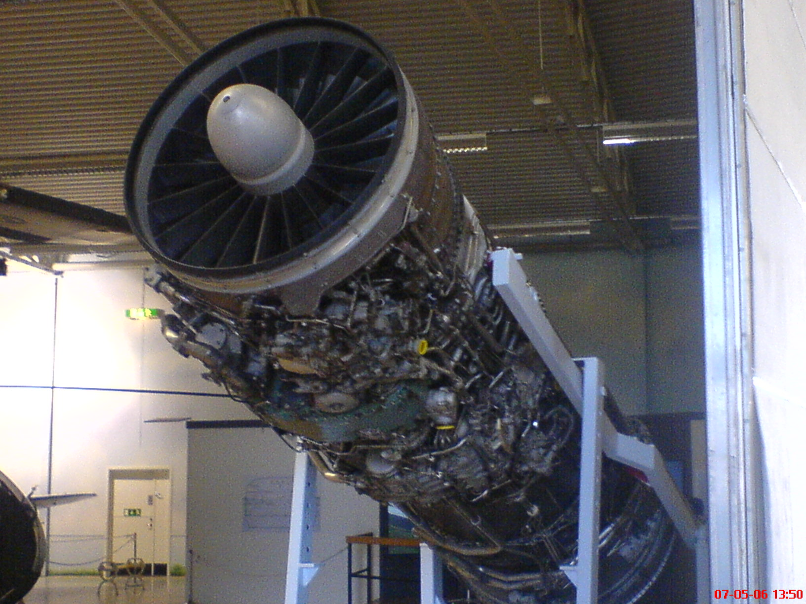 Volvo Aero RM8, utställd på Flygvapenmuseum